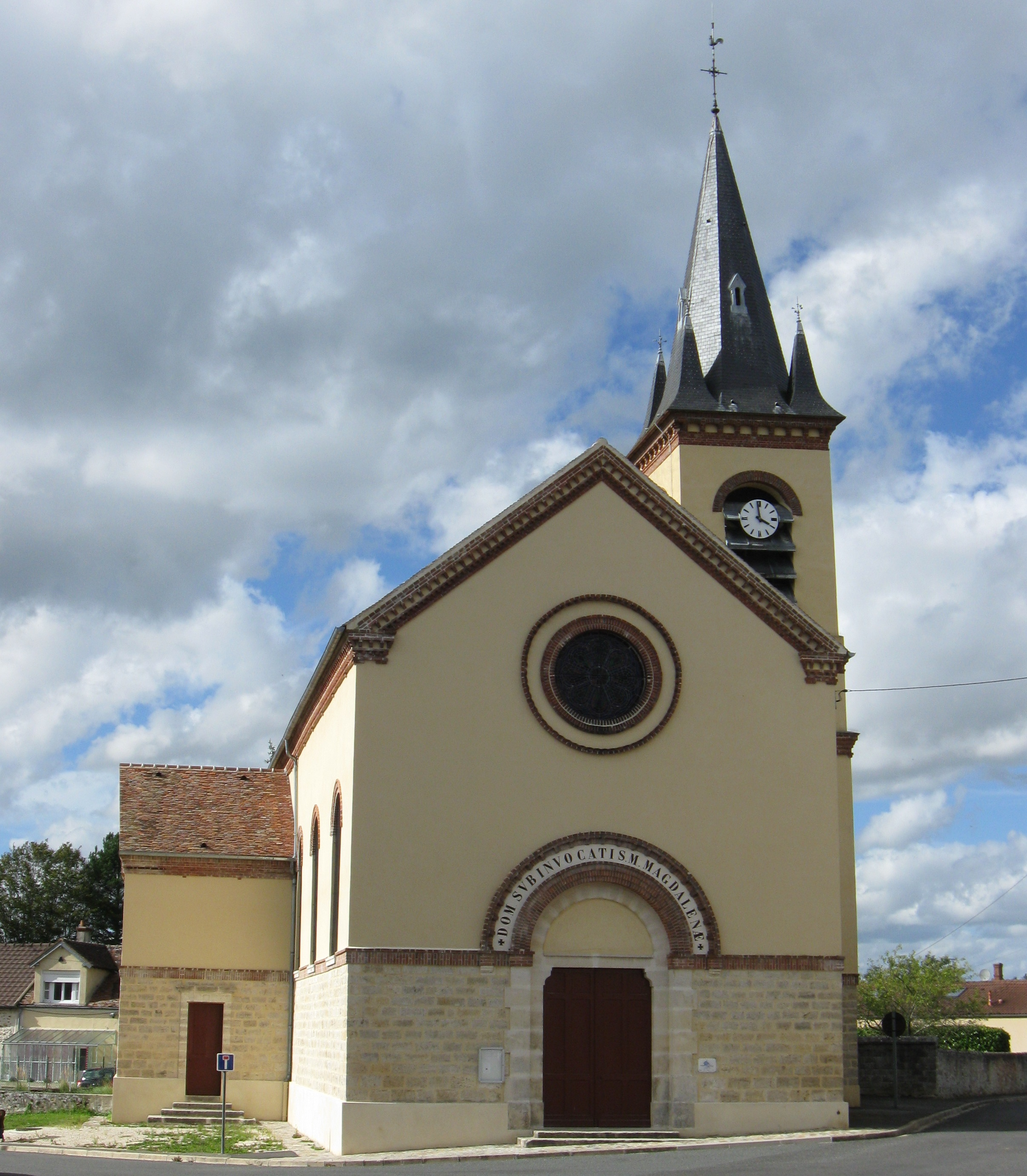 Église Sainte-Marie-Madeleine d'Échouboulains. (Seine-et-Marne, région Île-de-France).